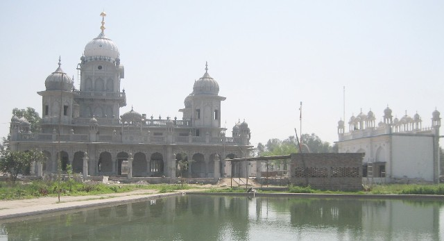 Gurudwara Shree Hut Sahib